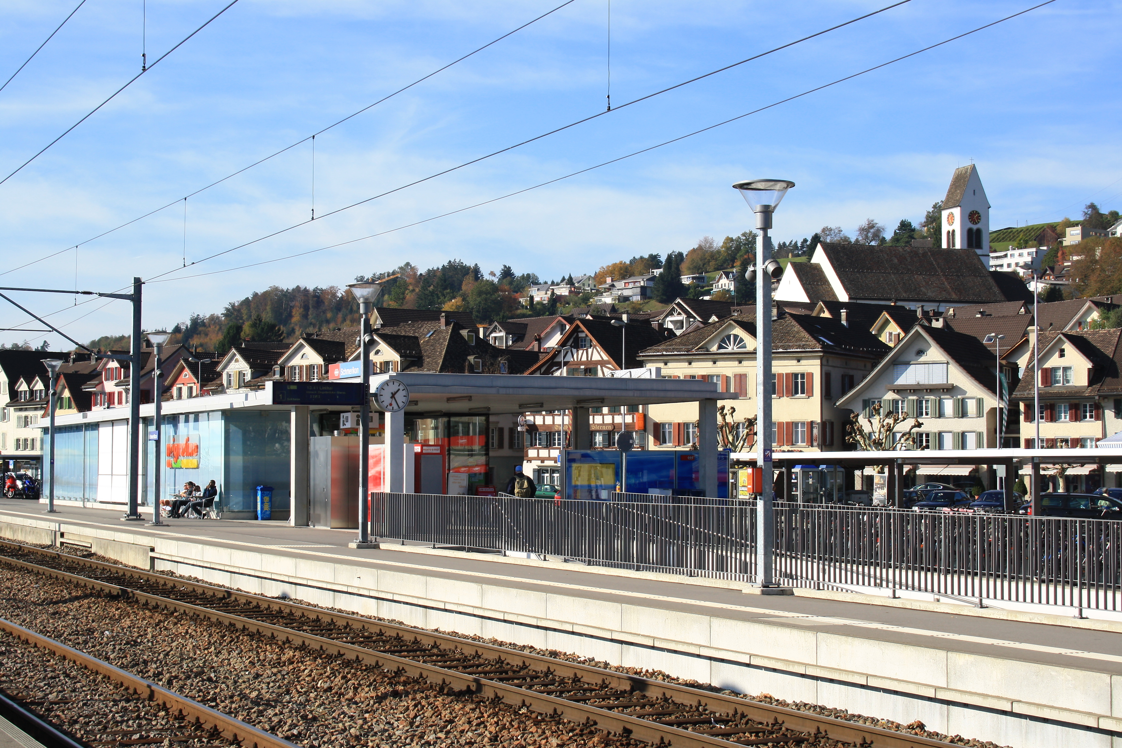 Schmerikon train station on Obersee (upper Lake Zürich) shore